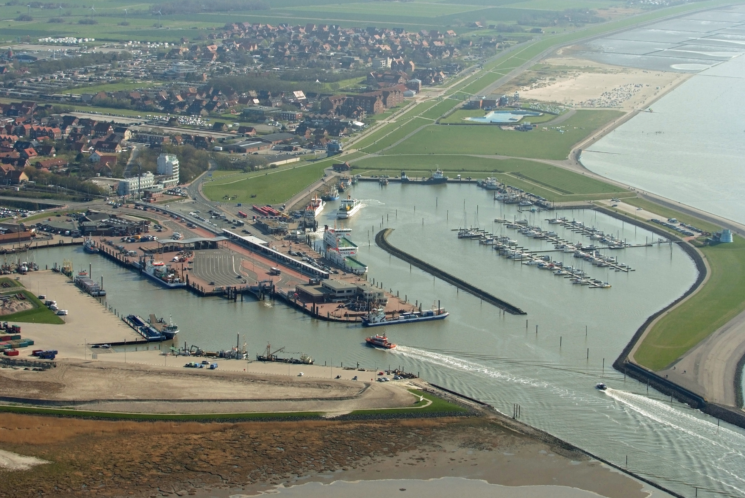 Norddeich Hafen / Fotoflug von Nordholz-Spieka nach Oldenburg und Papenburg